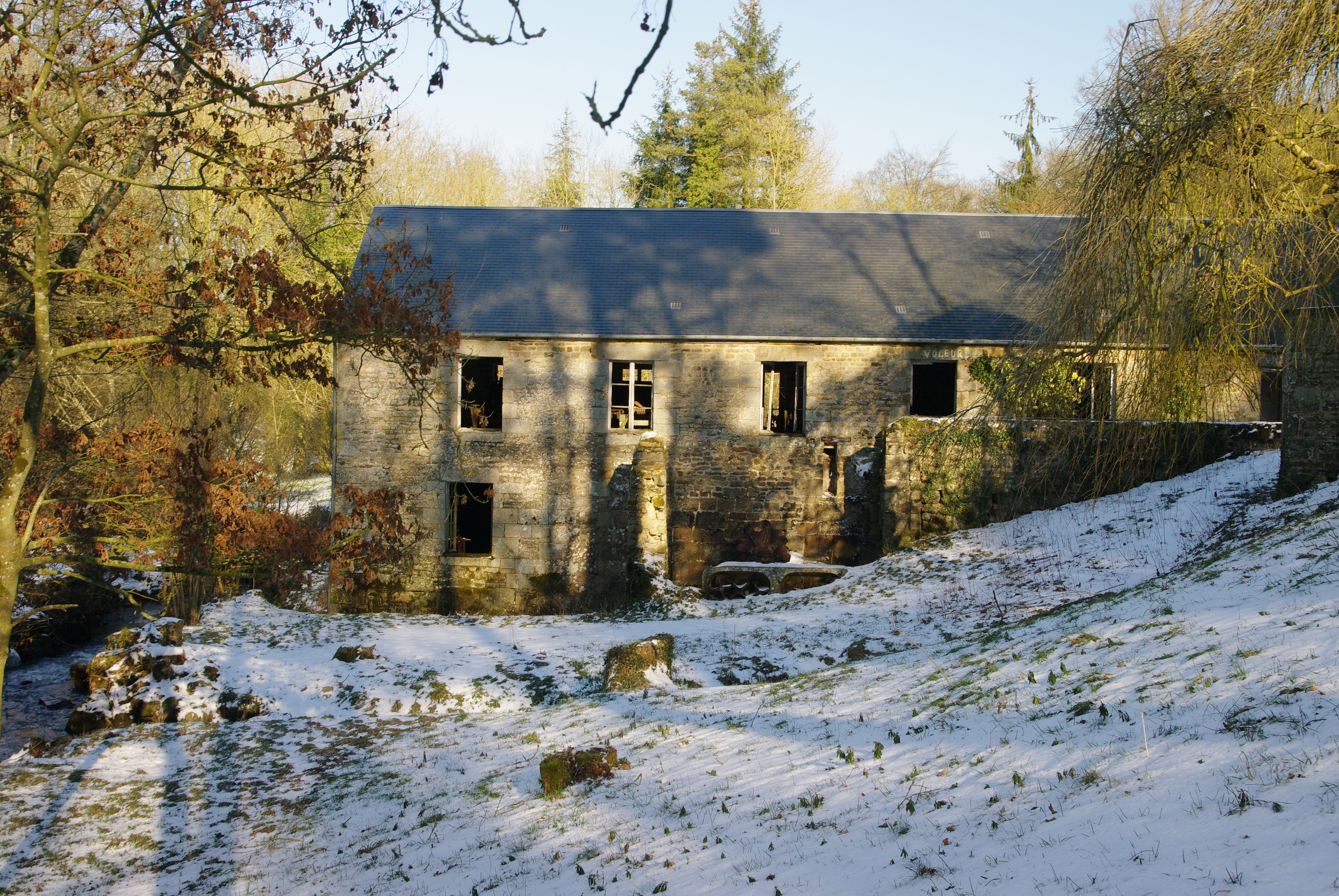 Filature de Rochefort (InscritInscrit, 19872002)